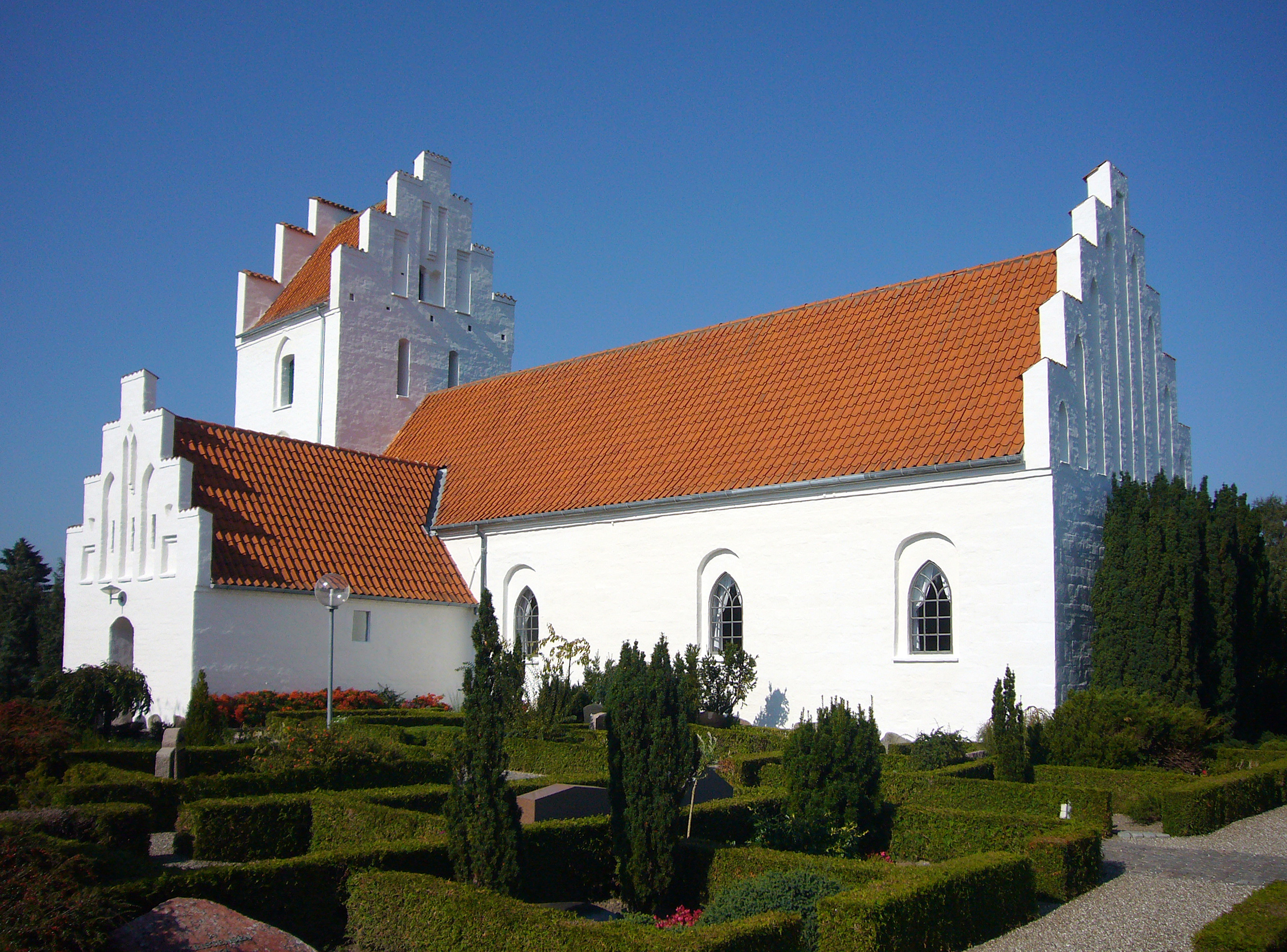 Karlslunde Kirke in Roskilde County, Denmark